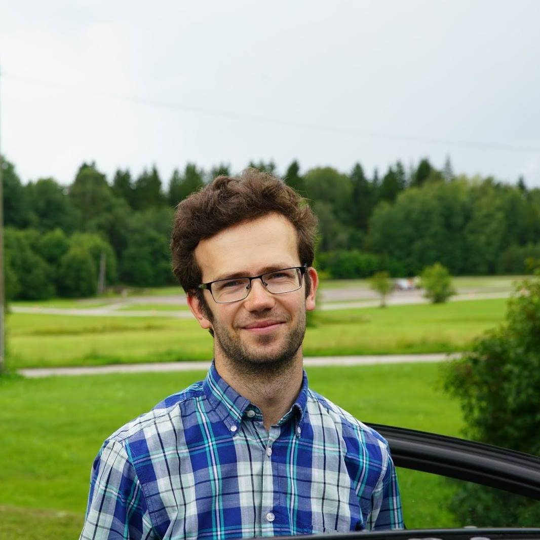 Lahkumisfoto (pildistas 12. juulil 2016 Tarmo Lukk, kui meil oli Raplas nn pilvehuviliste rakukese kokkutulek).